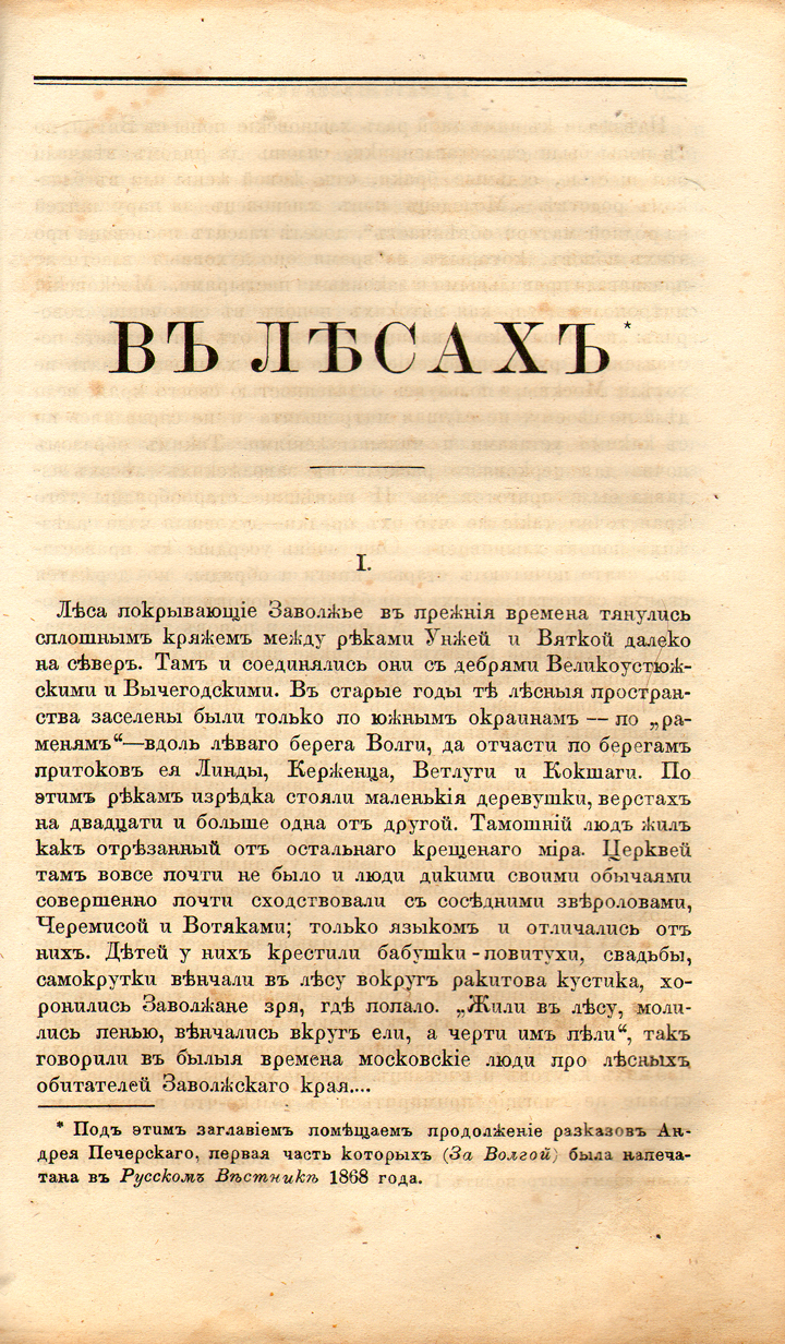 П.И.Мельников-Печерский, роман "В лесах". "Русский вестник", 1871, январь